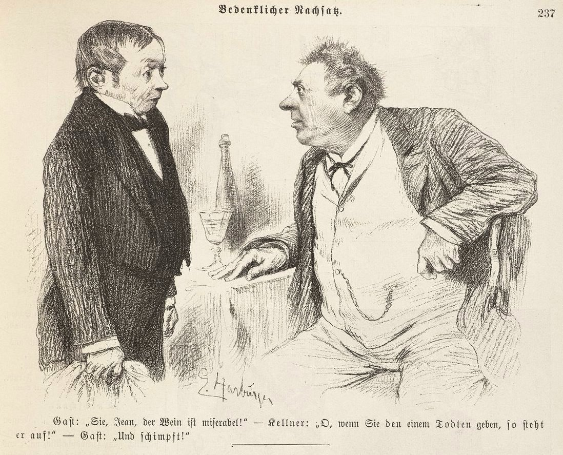 Werke Edmund Harburger